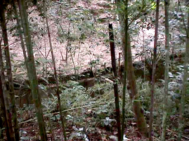 Lecho de la Quebrada La Boyera a nivel del Polideportivo